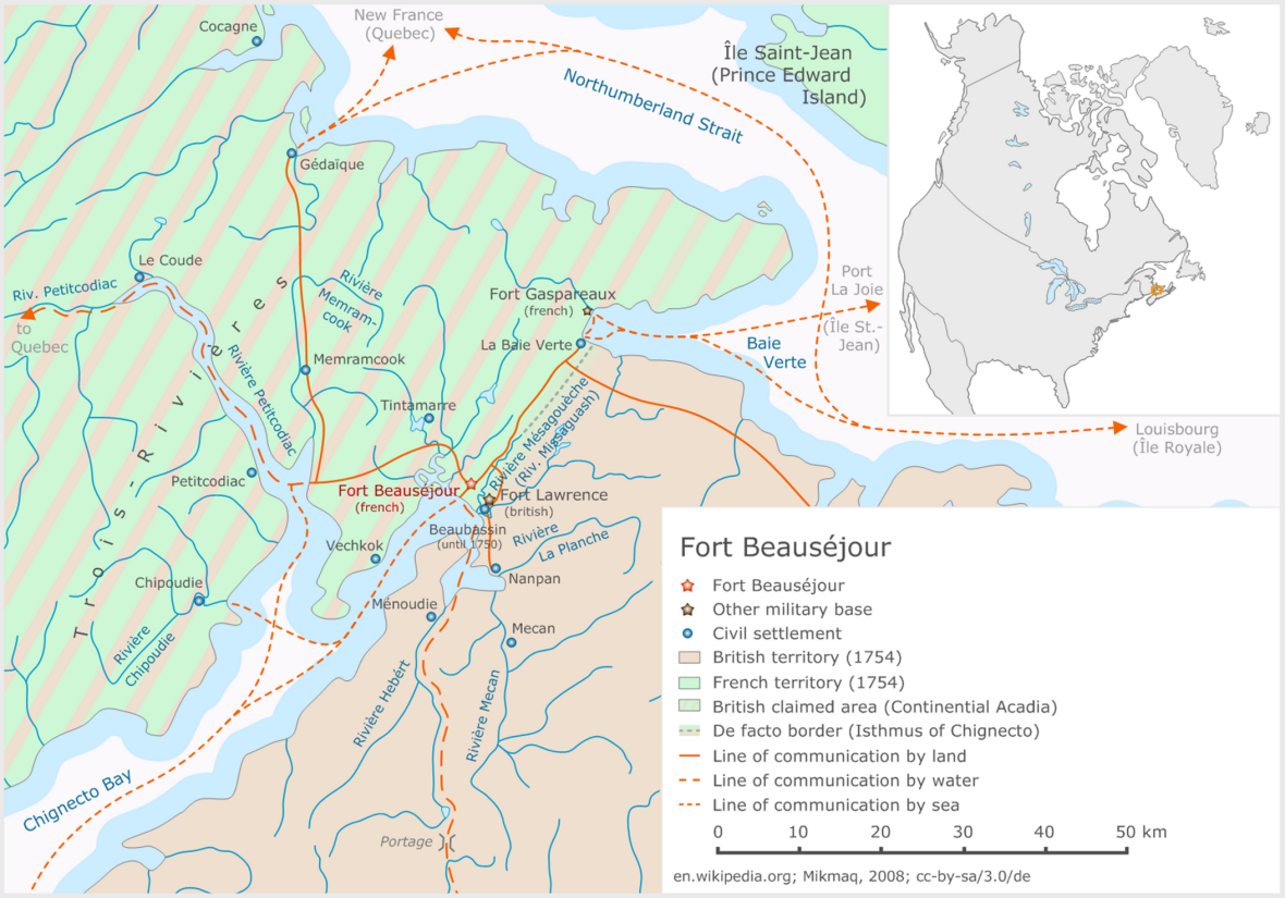 Fort Beauséjour